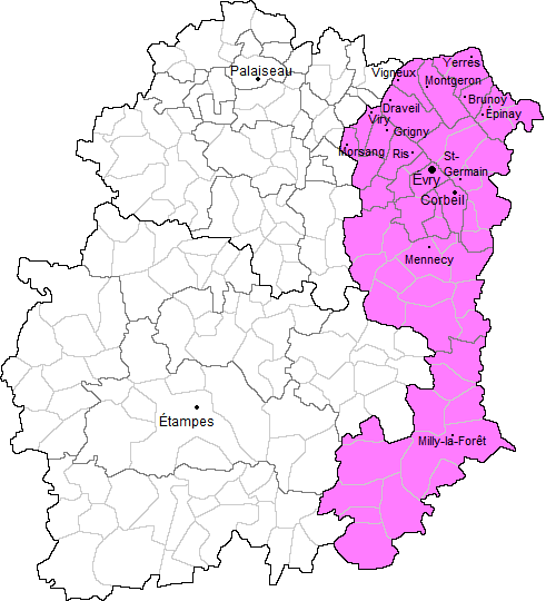 Carte des communes de l'arrondissement d'Évry (91)